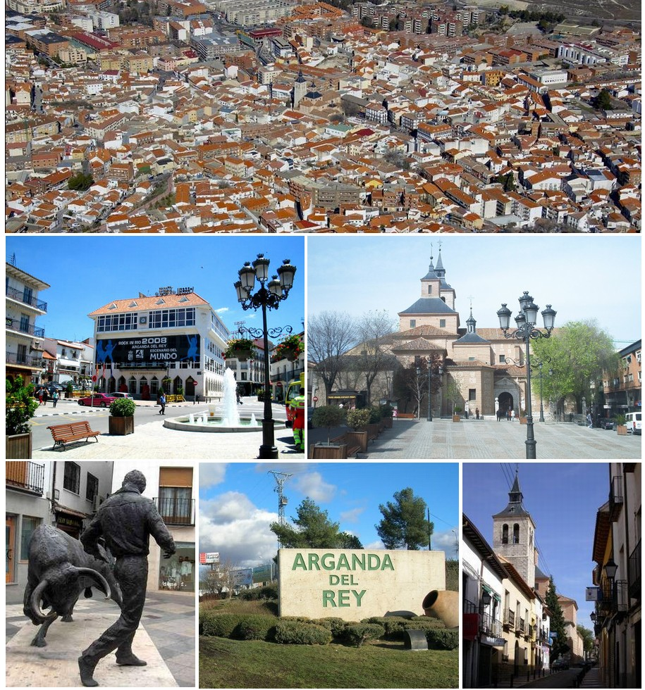 Collage de Arganda del Rey hecho por mi.